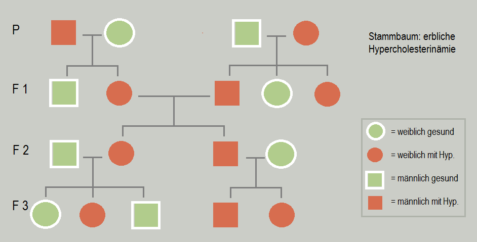 Stammbaum erbliche Hypercholesterinämie